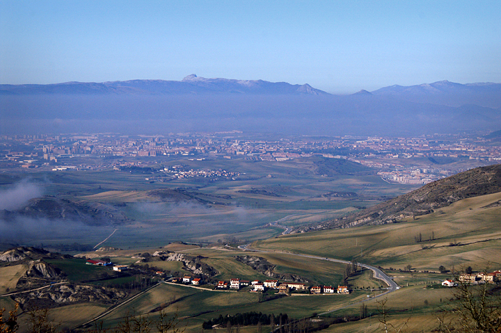 Iruñerria Irulegitik ikusia